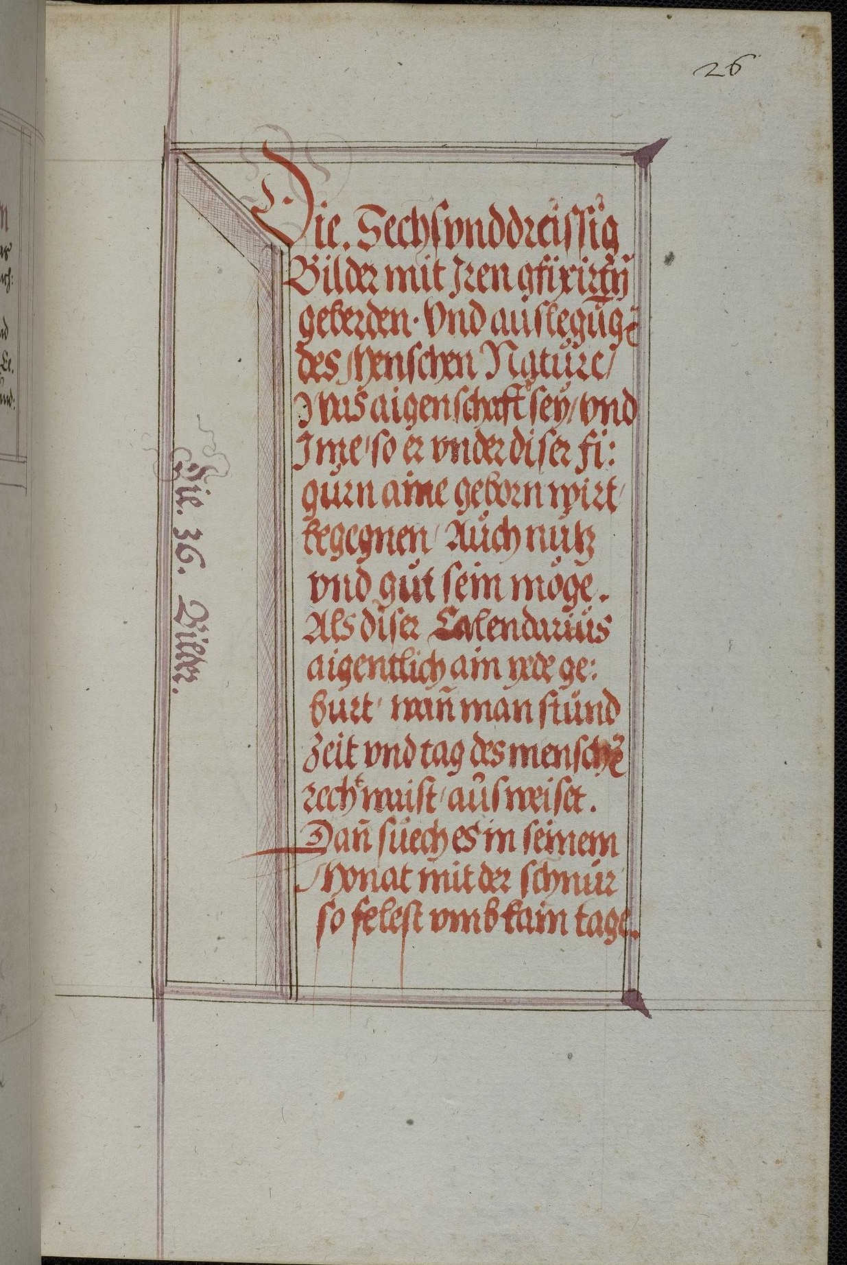 Codex Palatinus germanicus 6, Blatt 26r der Handschrift: Über Sternbilderkinder (Geburtsastrologie)